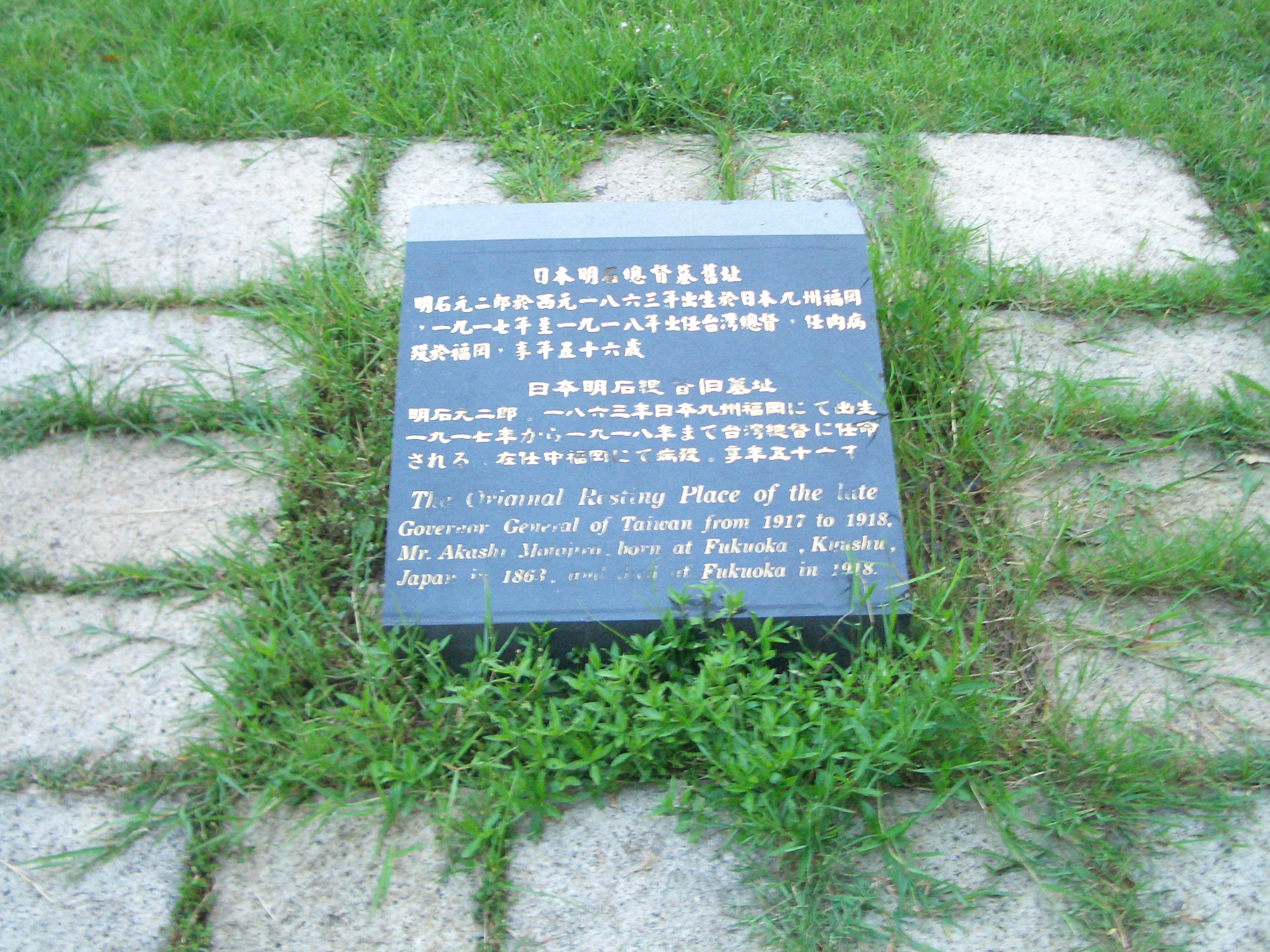 台灣台北市林森公園日治時期第7任總督明石元二郎墓舊址。